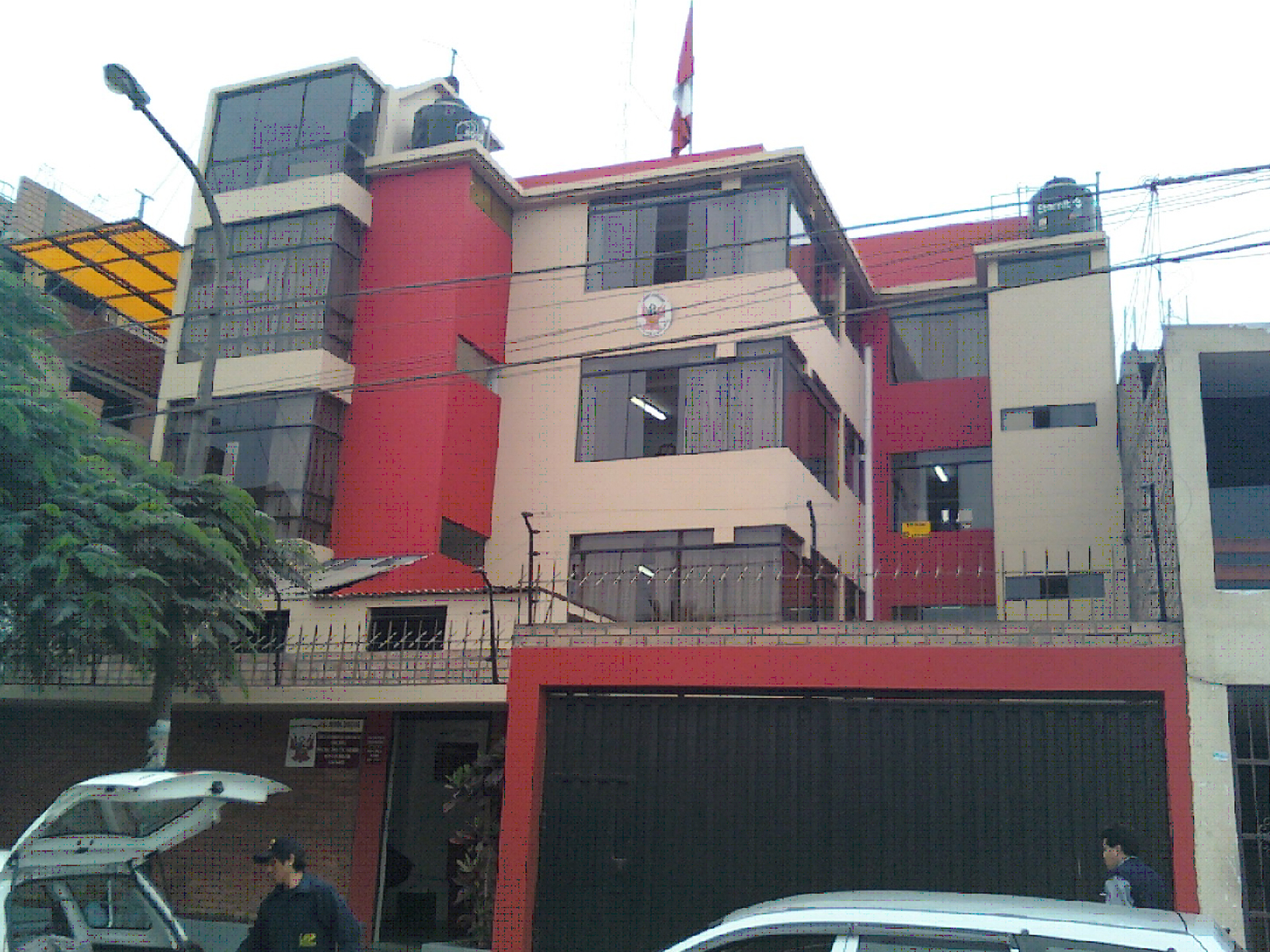 juzgado san martin